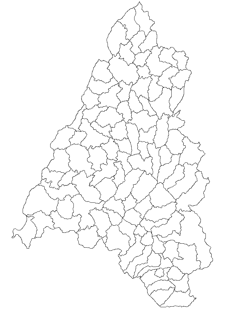 Categorie:Hărţi ale judeţului Bihor